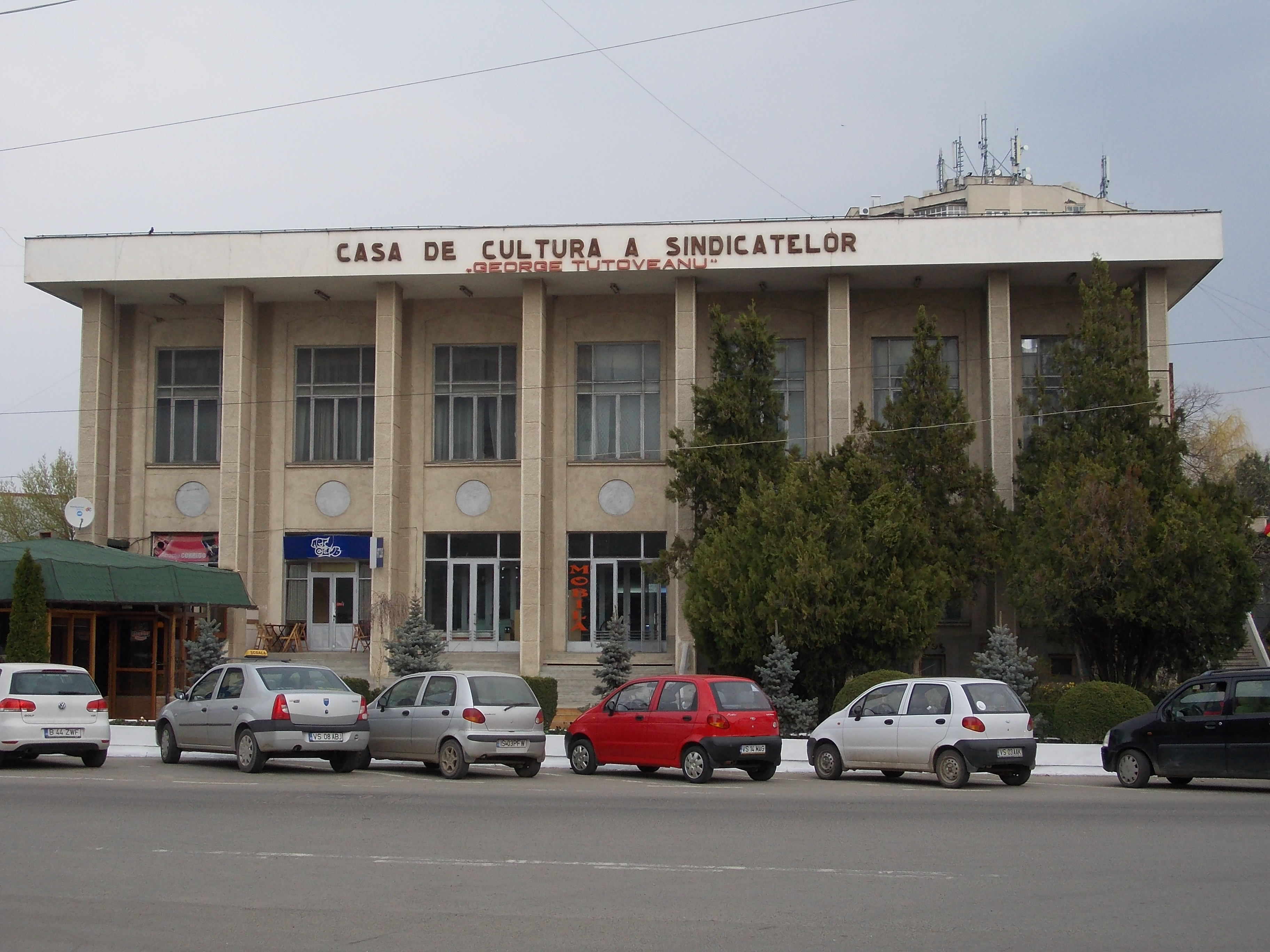 casa de cultură din Bârlad